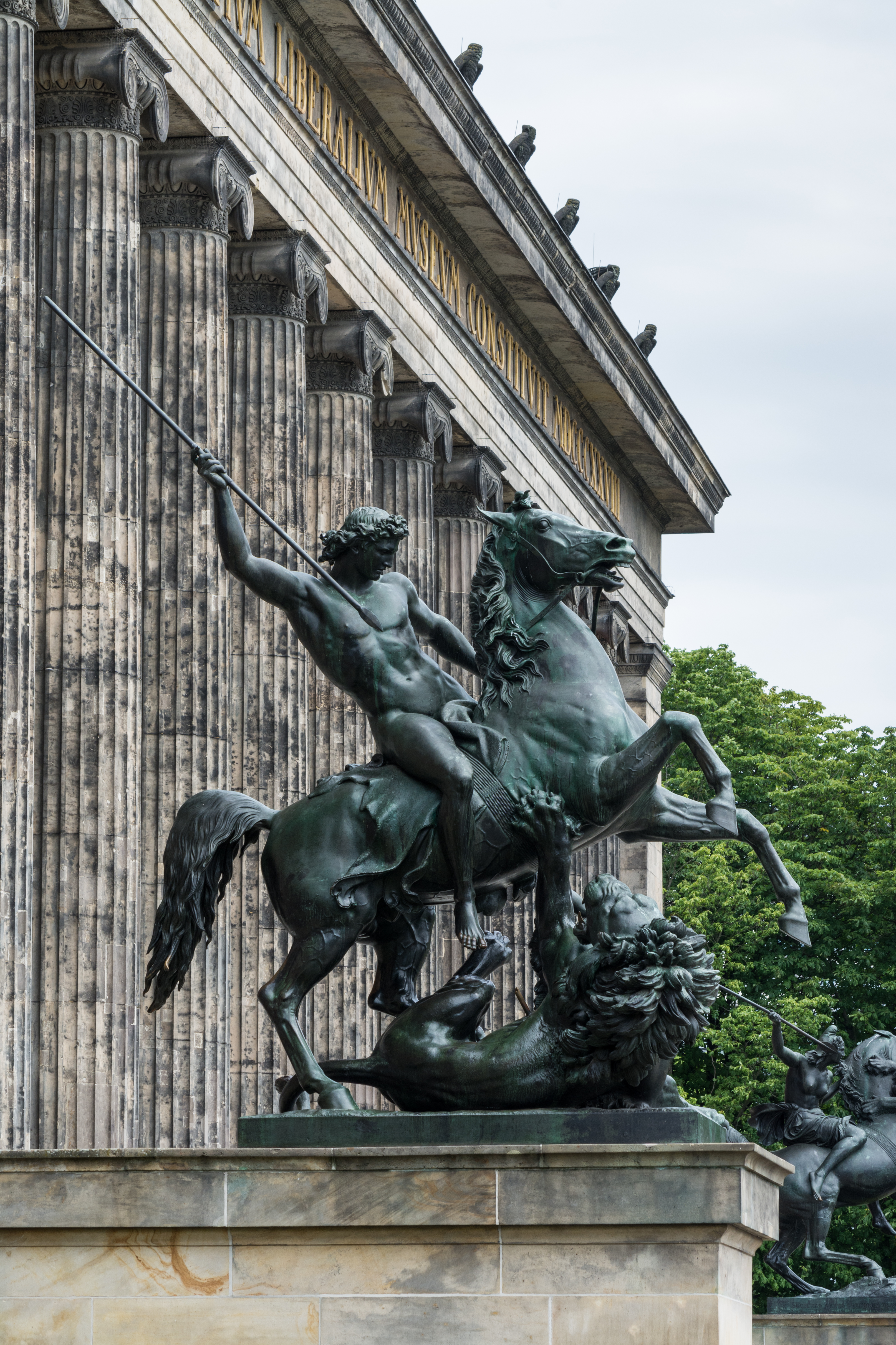 Statue Löwenkämpfer an der Freitreppe des Alten Museums in Berlin-Mitte. This is a photograph of an architectural monument.